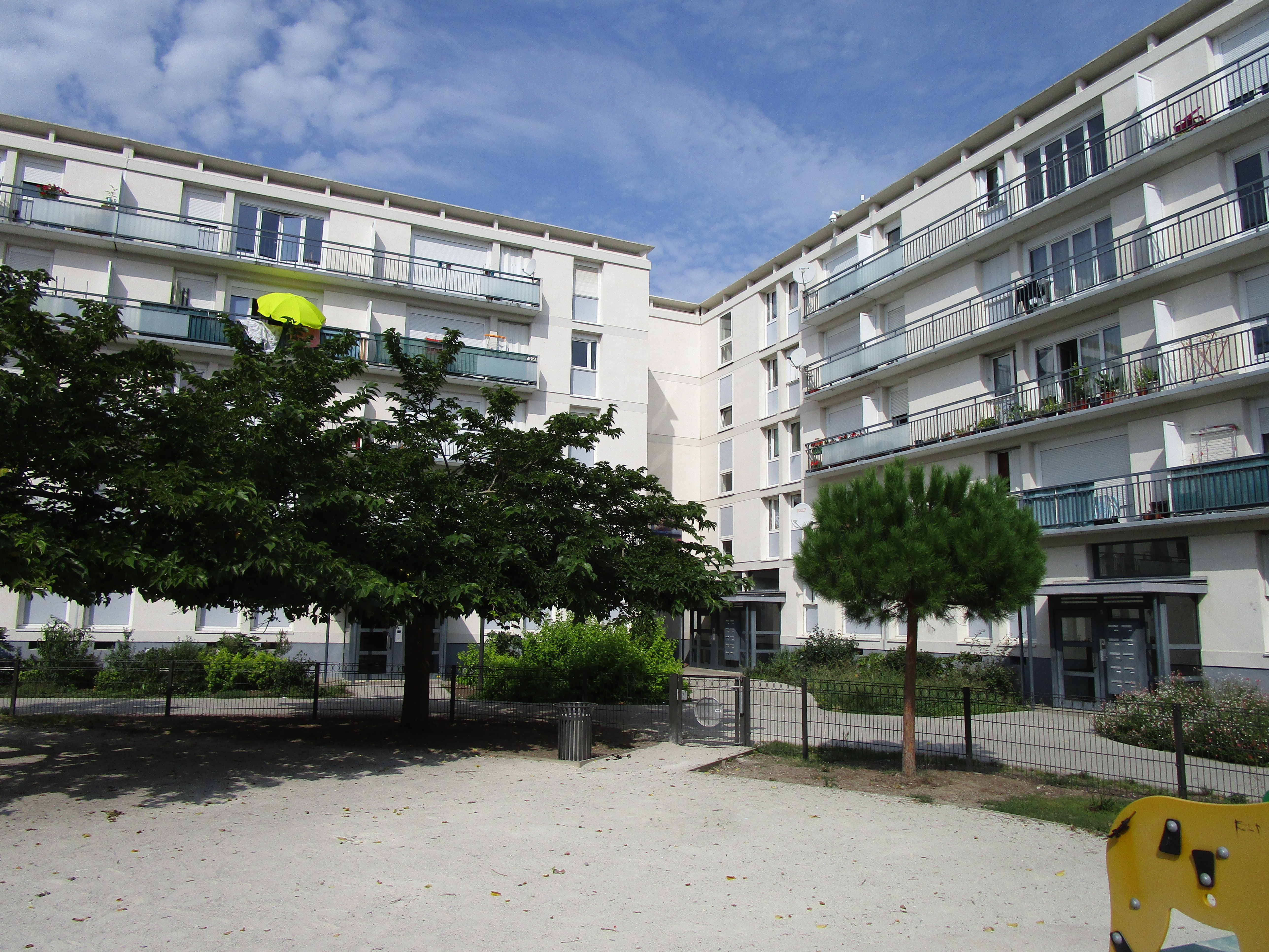 La place Montgolfier au sein de la cité Maryse-Bastié, dans le quartier Giraudeau de Tours. Construit en 1961.